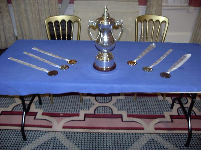 Ein Pokal und sechs Medaillen.